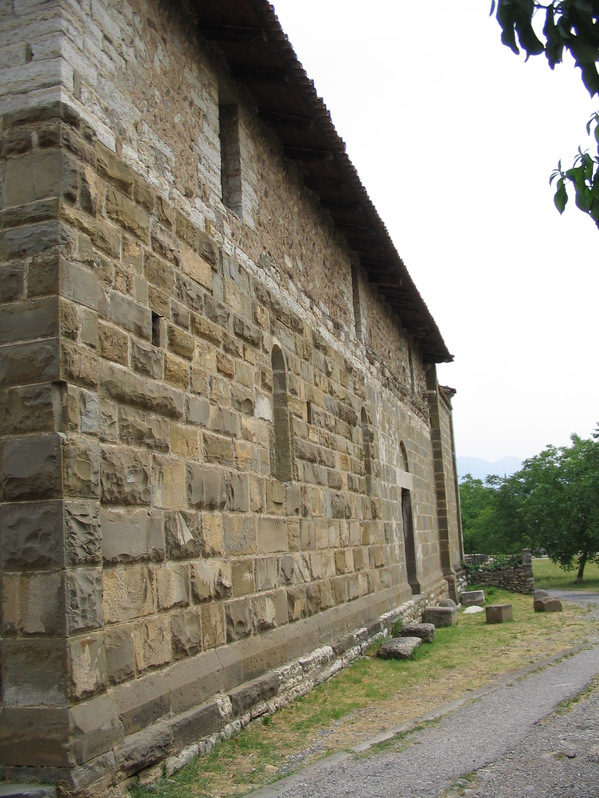 San Giorgio in Lemine, chiesa romanica.